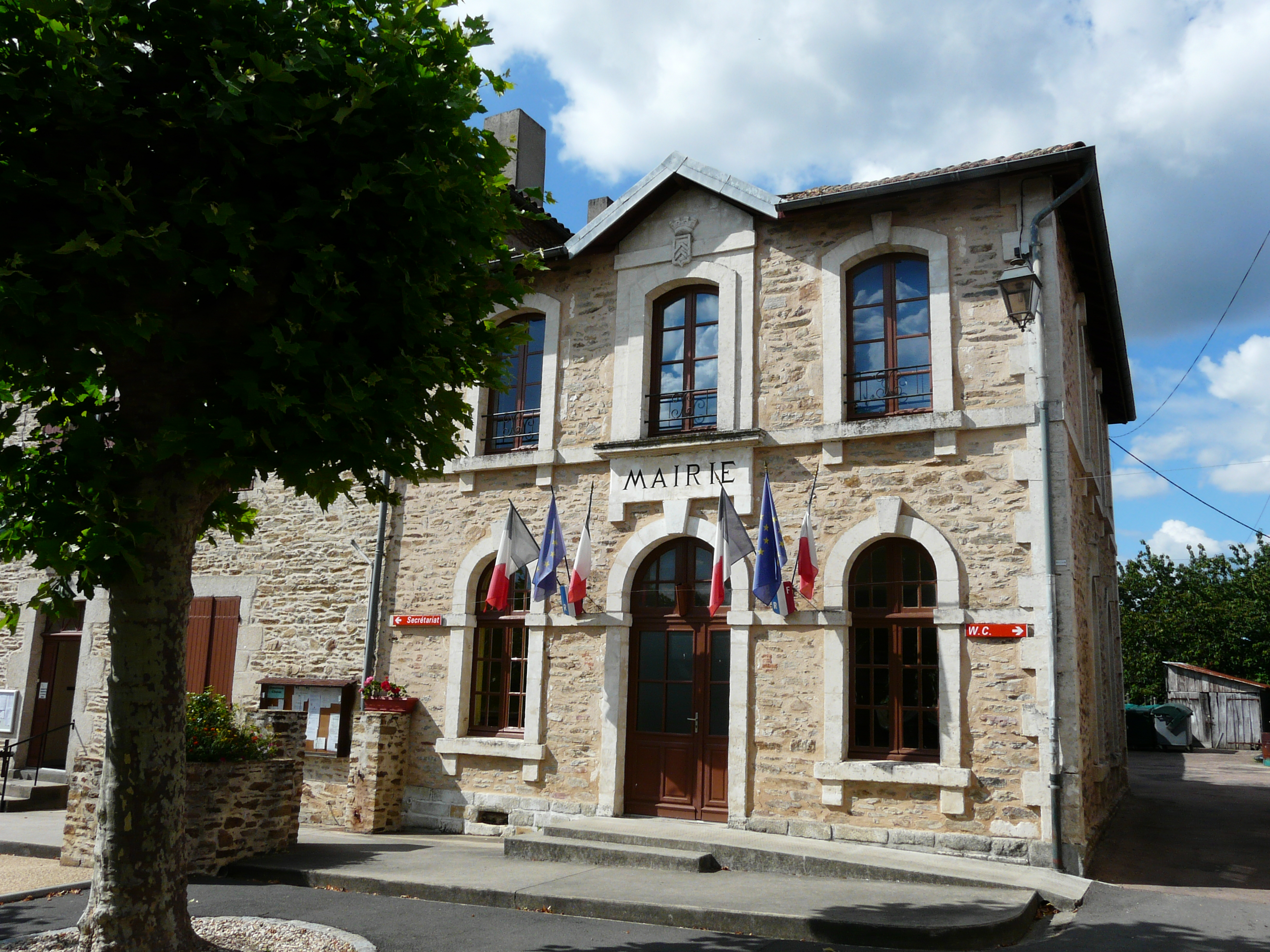 La mairie de Mialet, Dordogne, France.